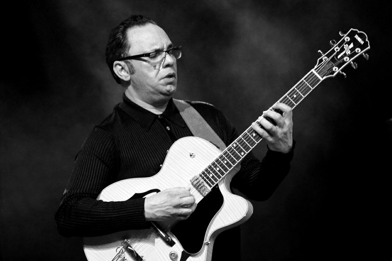 Der Jazzgitarrist Biréli Lagrène auf dem Jazzfestival St. Ingbert 2015